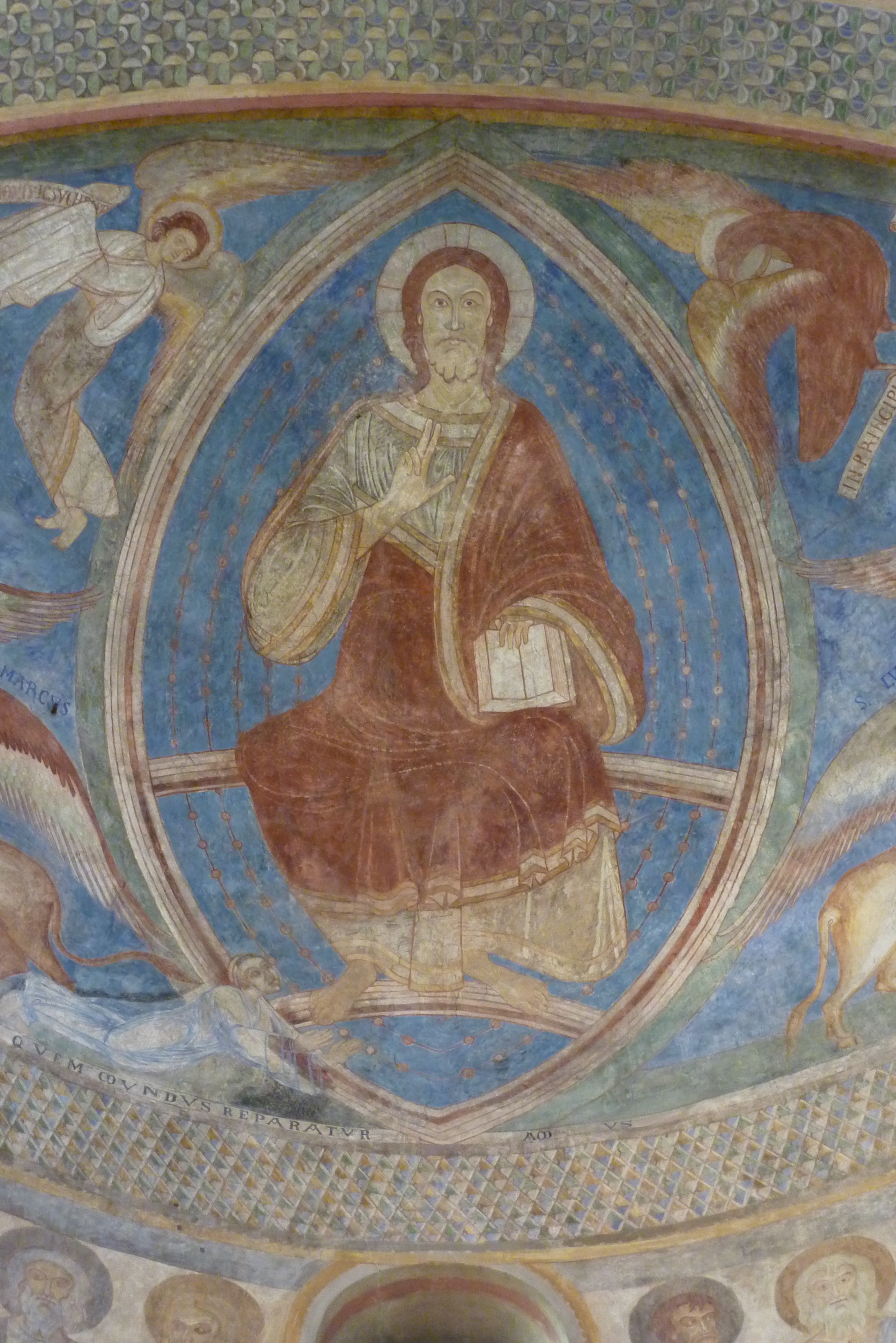 Katholische Kirche St. Maria Magdalena und St. Andreas des ehemaligen Prämonstratenser-Klosters Knechtsteden in Dormagen im Rhein-Kreis Neuss (Nordrhein-Westfalen), Fresko in der Westapsis, mehrfach restauriert; Darstellung: Majestas Domini, umgeben von den Evangelistensymbolen, zu Füßen Christi der Stifter Albert von Aachen (Ausschnitt)